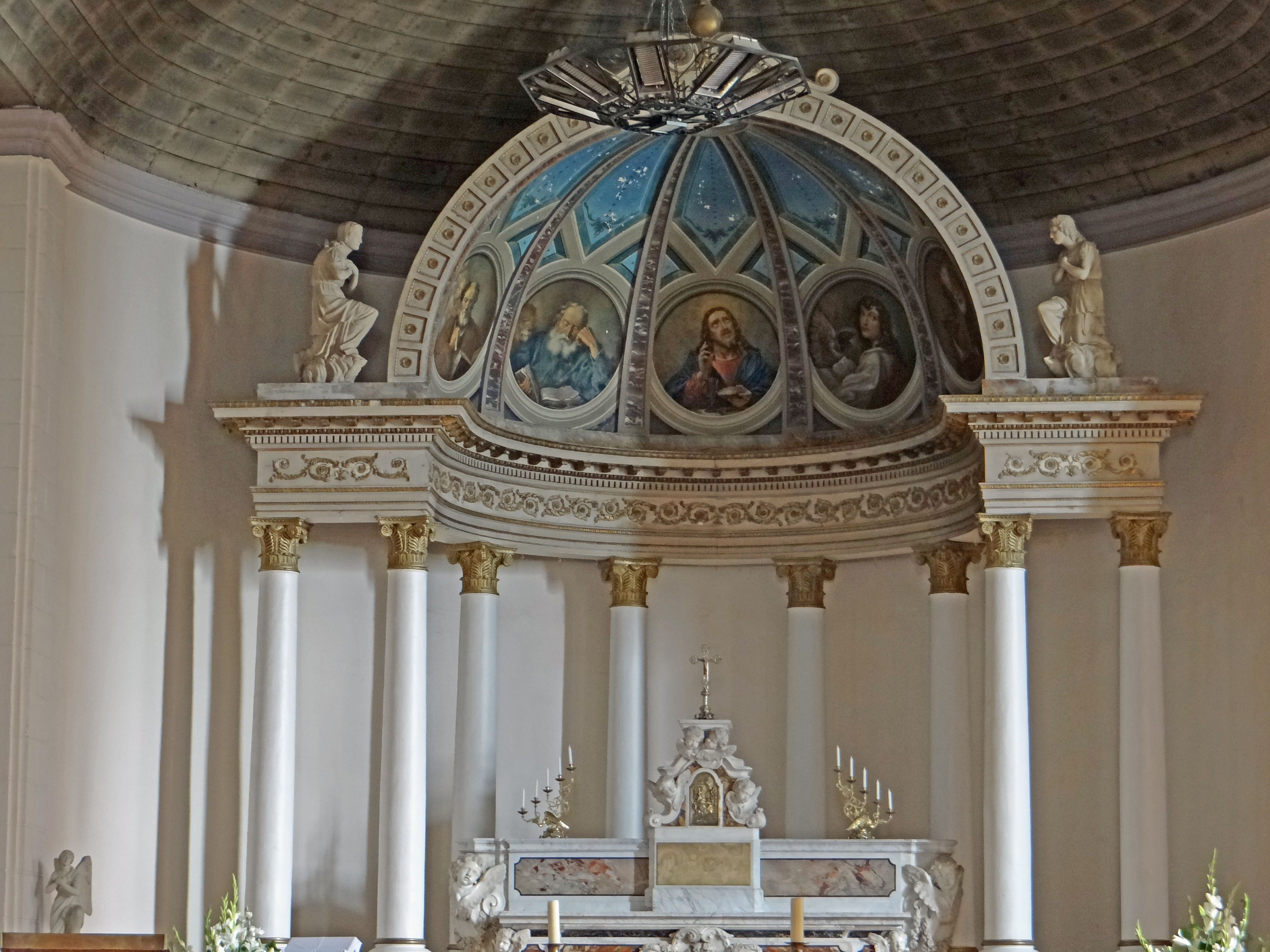 Clairac - Église Saint-Pierre-ès-Liens - Maître-autel